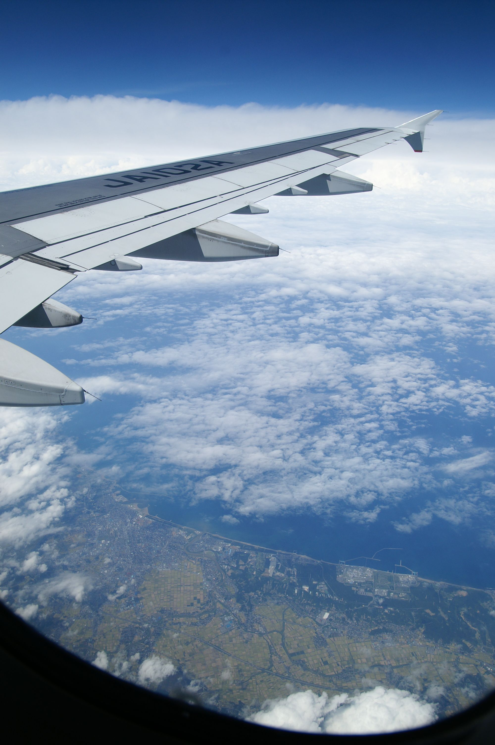 柏崎刈羽原子力発電所が見えました。 (2006/09/10 In Flight, NH704, JAPAN)